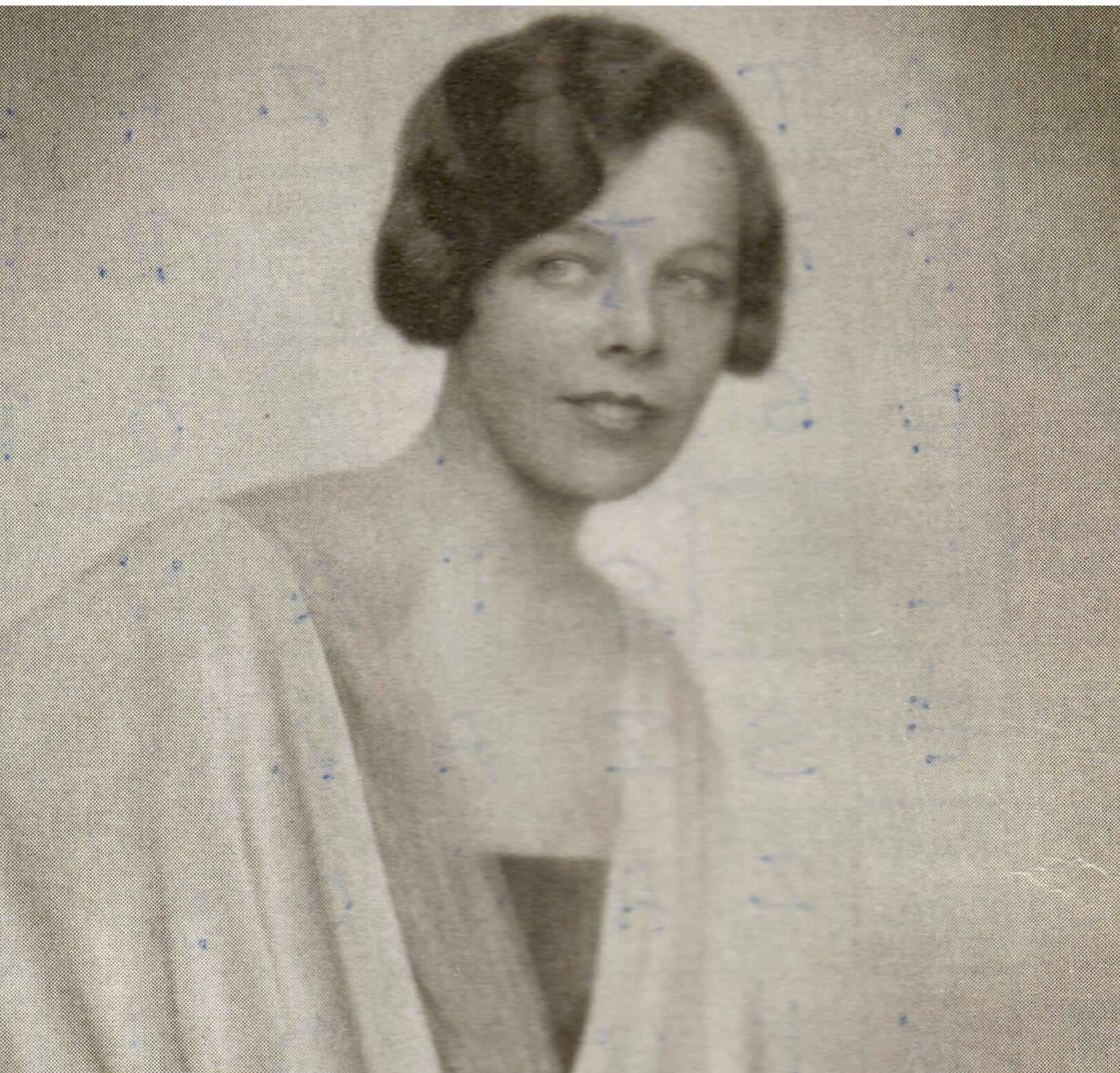 Enkelin des führenden Politikers Gyula Graf Andrássy (* 1823, † 1890)